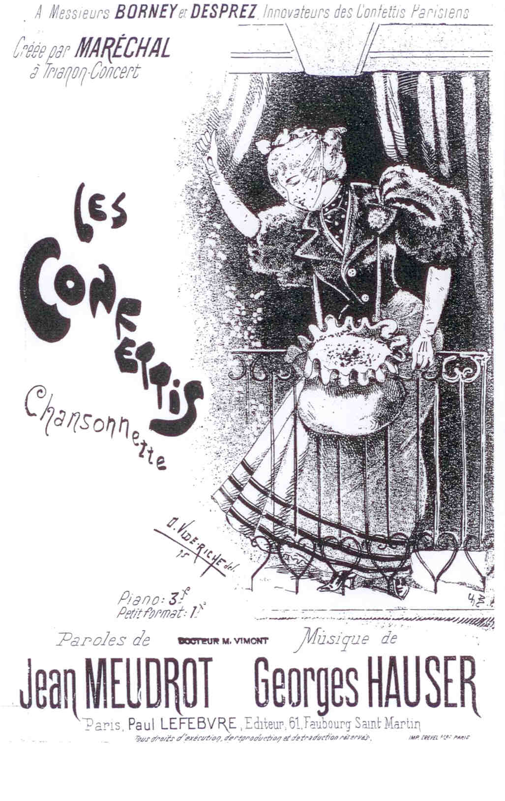 Une parisienne jetant des confetti. Le document original est imprimé en brun-rouge.